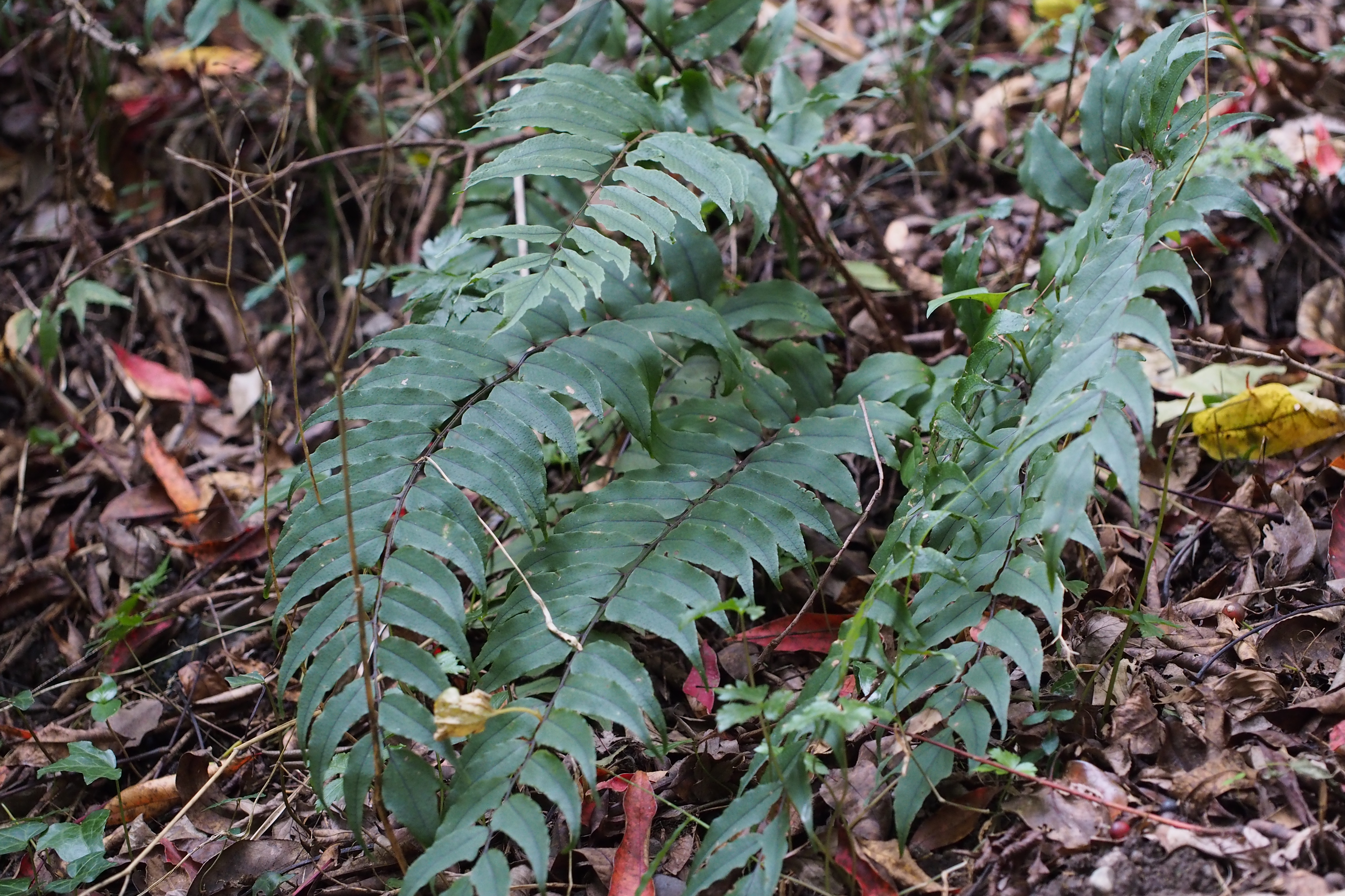 ヤブソテツ.